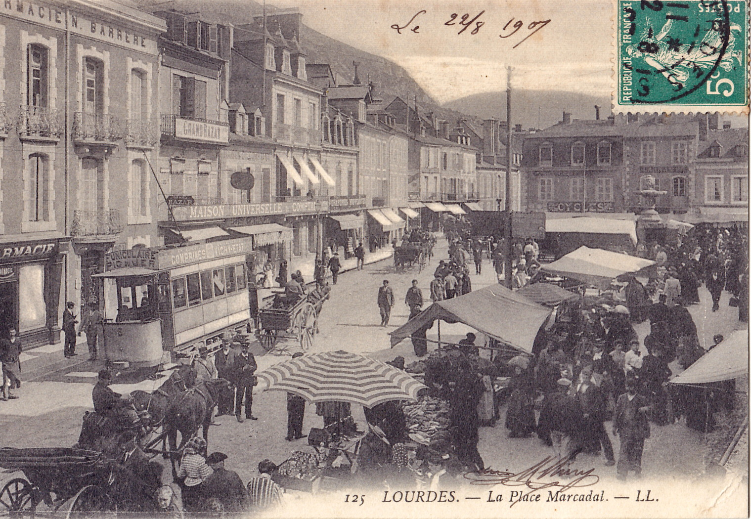 Carte postale ancienne éditée par LL, n°125 :LOURDES - La Place Mercadal